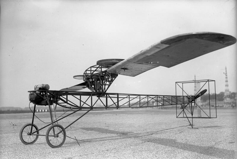 Ein interessantes Modell eines Kreisel-Flugzeuges des deutschen Ingenieurs Zaschka! Inseressant ist die Anbringung der rotierenden Tragflächen. Der Propeller befindet sich hinten. Mit den Versuchen soll demnächst begonnen werden. - Unser Bild zeigt das Rotations-Flugzeug des deutschen Ingenieurs Zaschka auf dem Centralflughafen in Berlin.